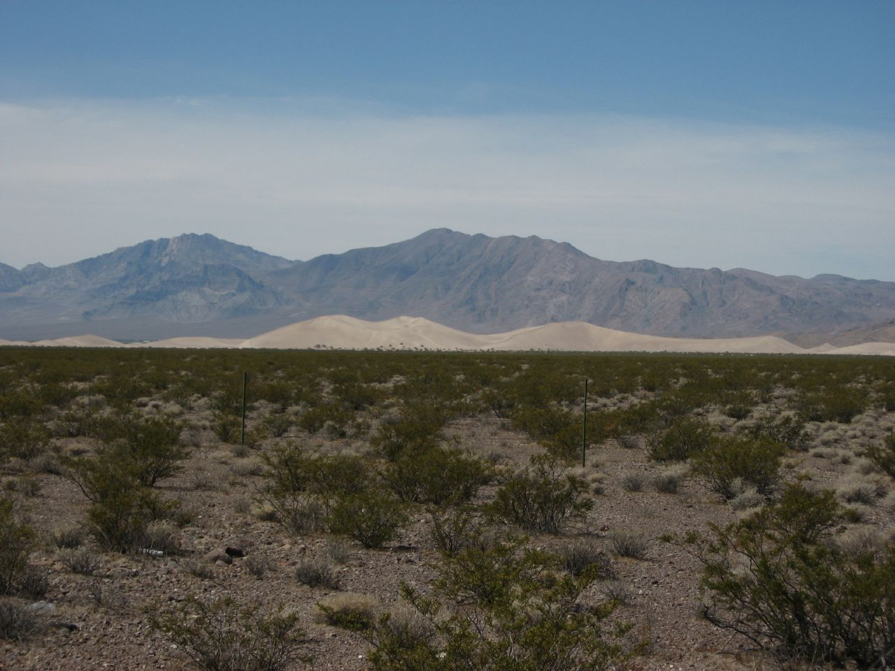 Big Dune, Amargosa Valley, Nevada